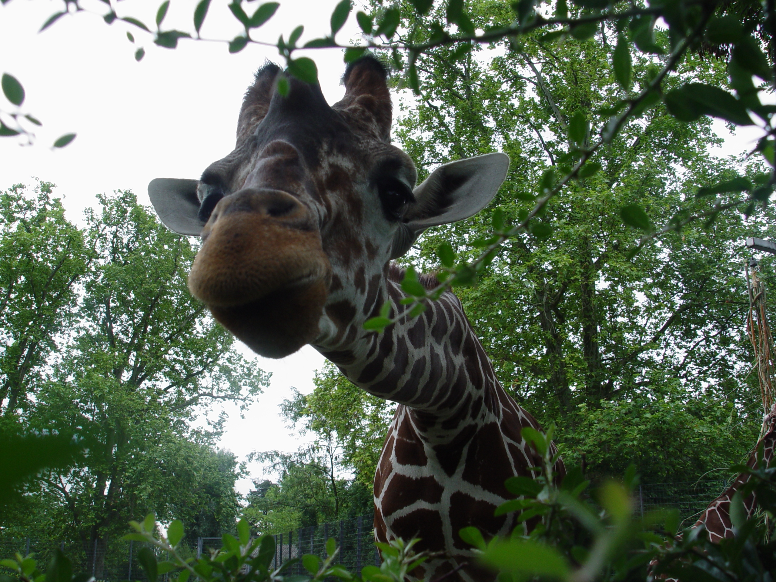 Giraffe in der Wilhelma in Stuttgart